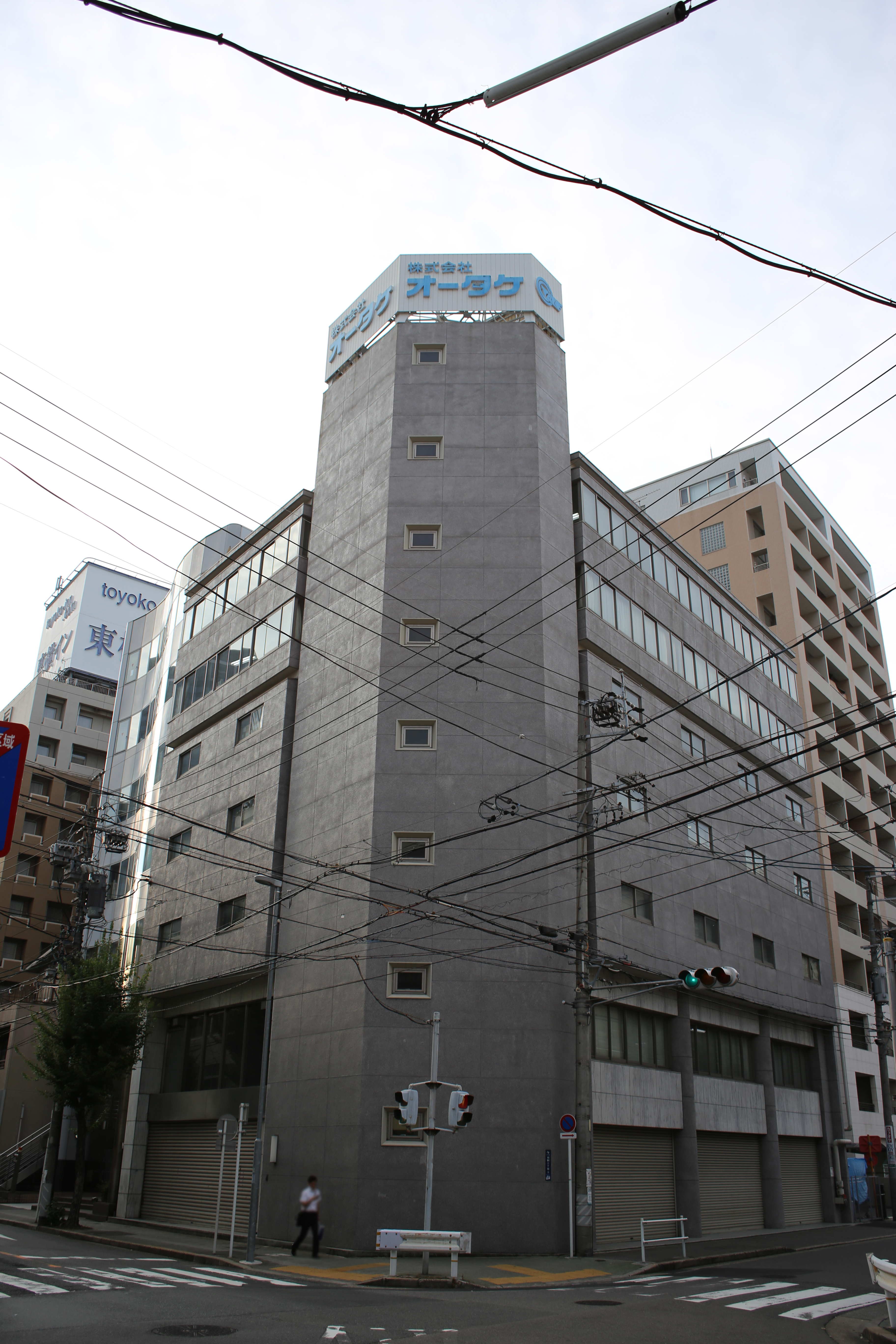 名古屋市中村区名駅三丁目の株式会社オータケ本社ビルを南側公道東側より撮影。ただし、肖像権保護のため、一部を画像処理。